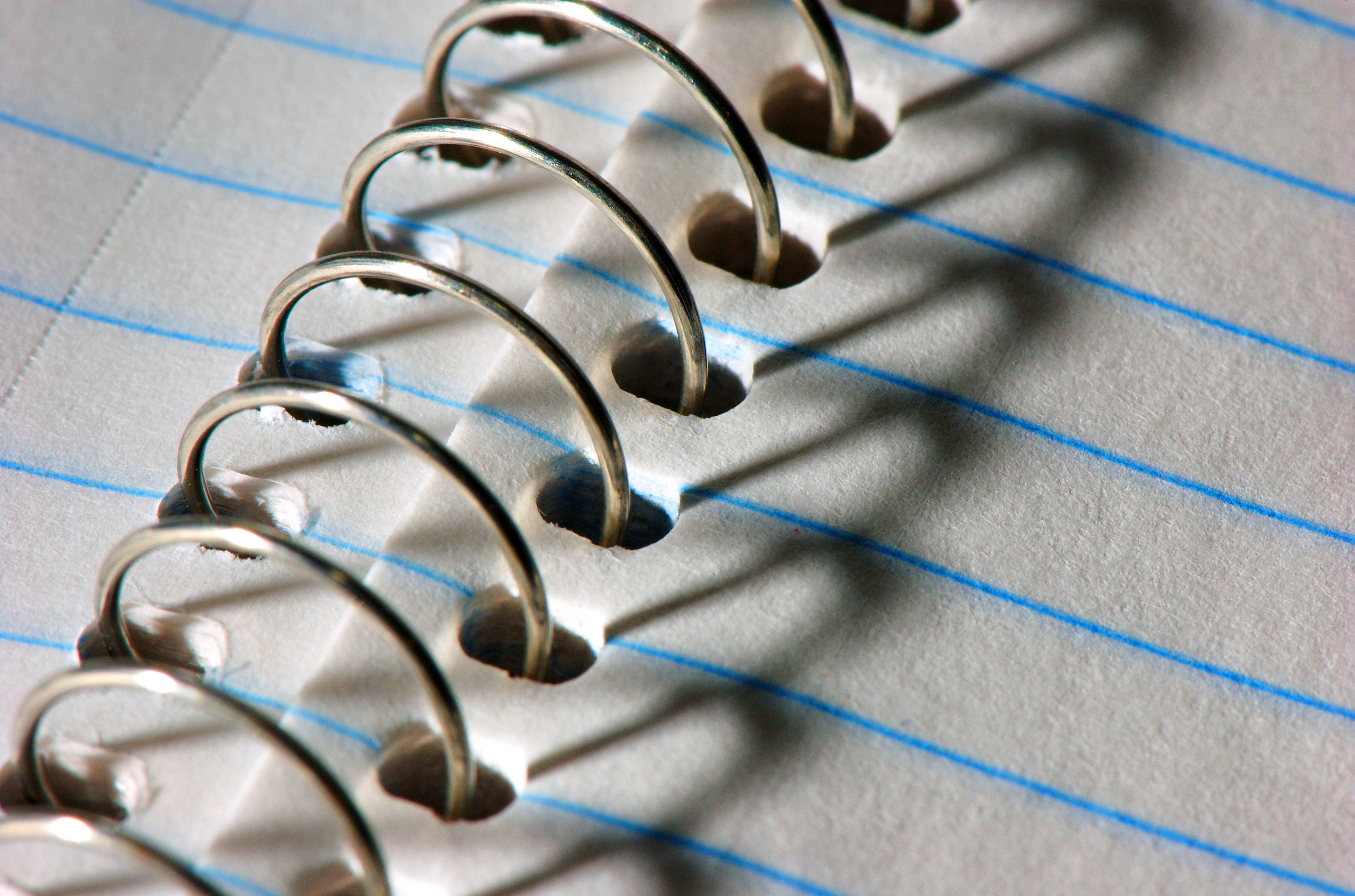 more spiralage